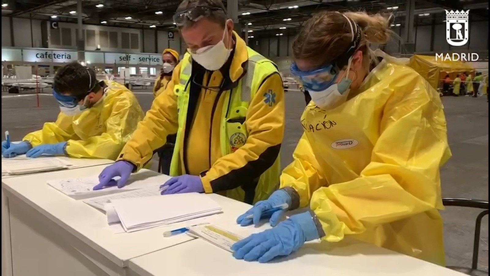 El personal sanitario de Madrid Salud, organismo autónomo dependiente del Ayuntamiento de Madrid, se incorporará a los servicios de atención primaria, al hospital de campaña habilitado en IFEMA y llevará a cabo labores de vigilancia en domicilios a personas con síntomas de coronavirus para reforzar las labores sanitarias que se están llevando a cabo para hacer frente a esta crisis.